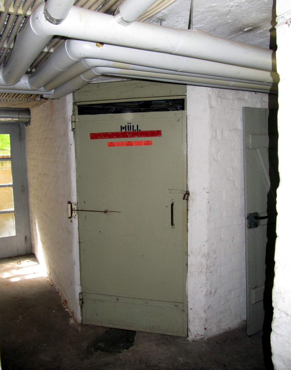 Müllkeller in Hamburg